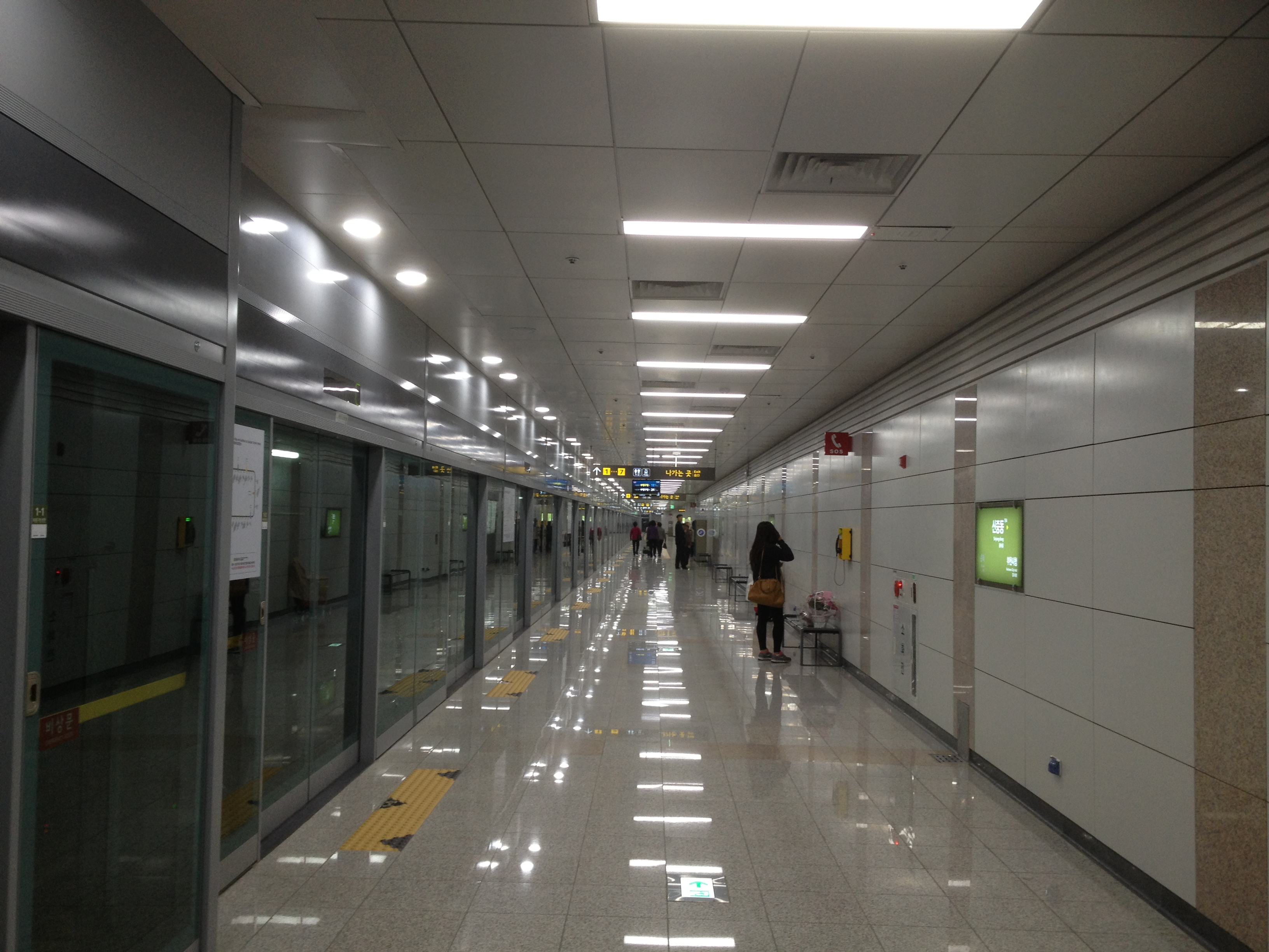 신중동역 승강장